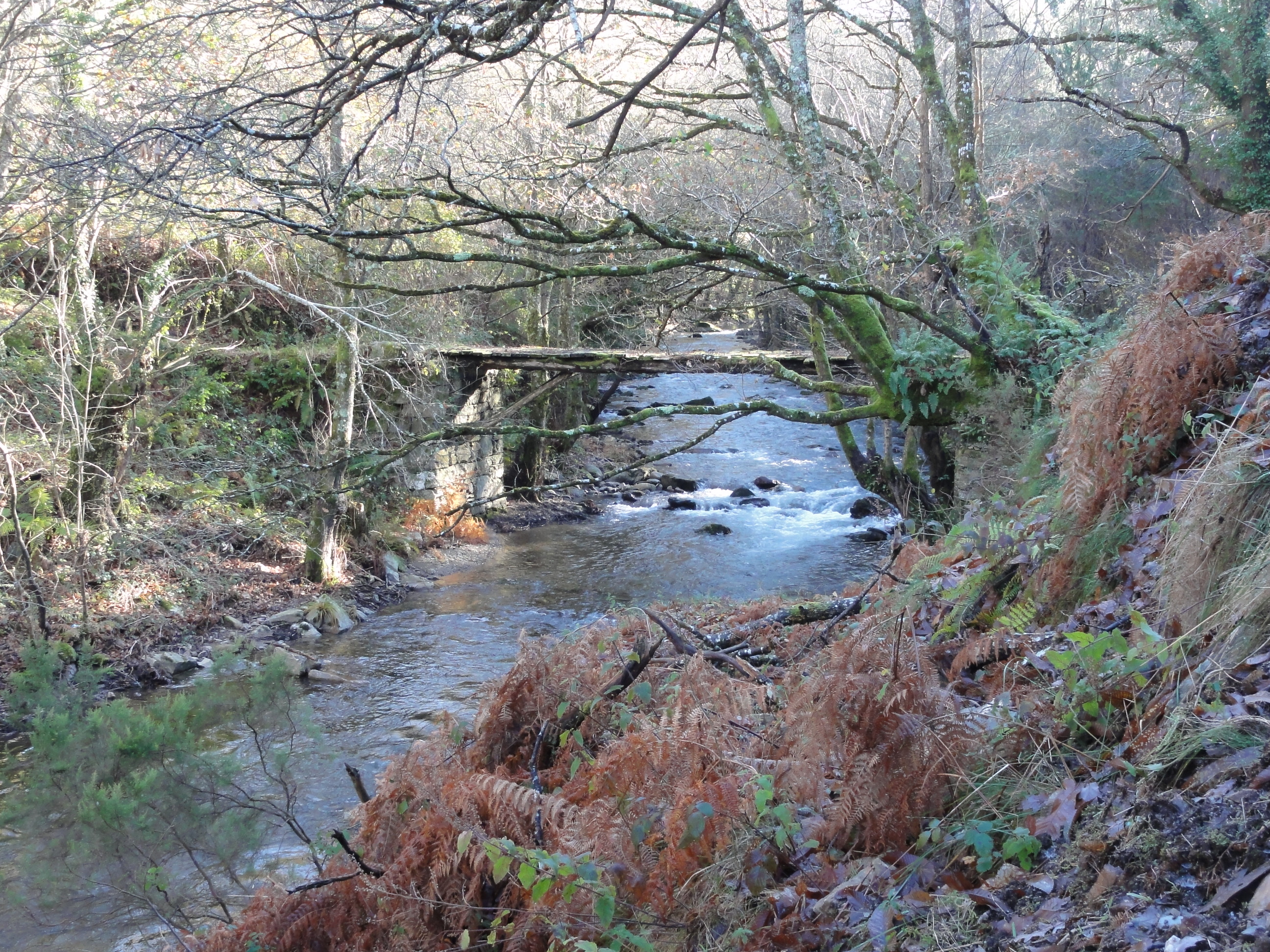 Río Eo: foto tomada al hacer la Ruta da Marronda (Alto Eo) This is a photography of a Site of Community Importance in Spain with the ID: ES1120002. Natura2000 entry, EEA entry